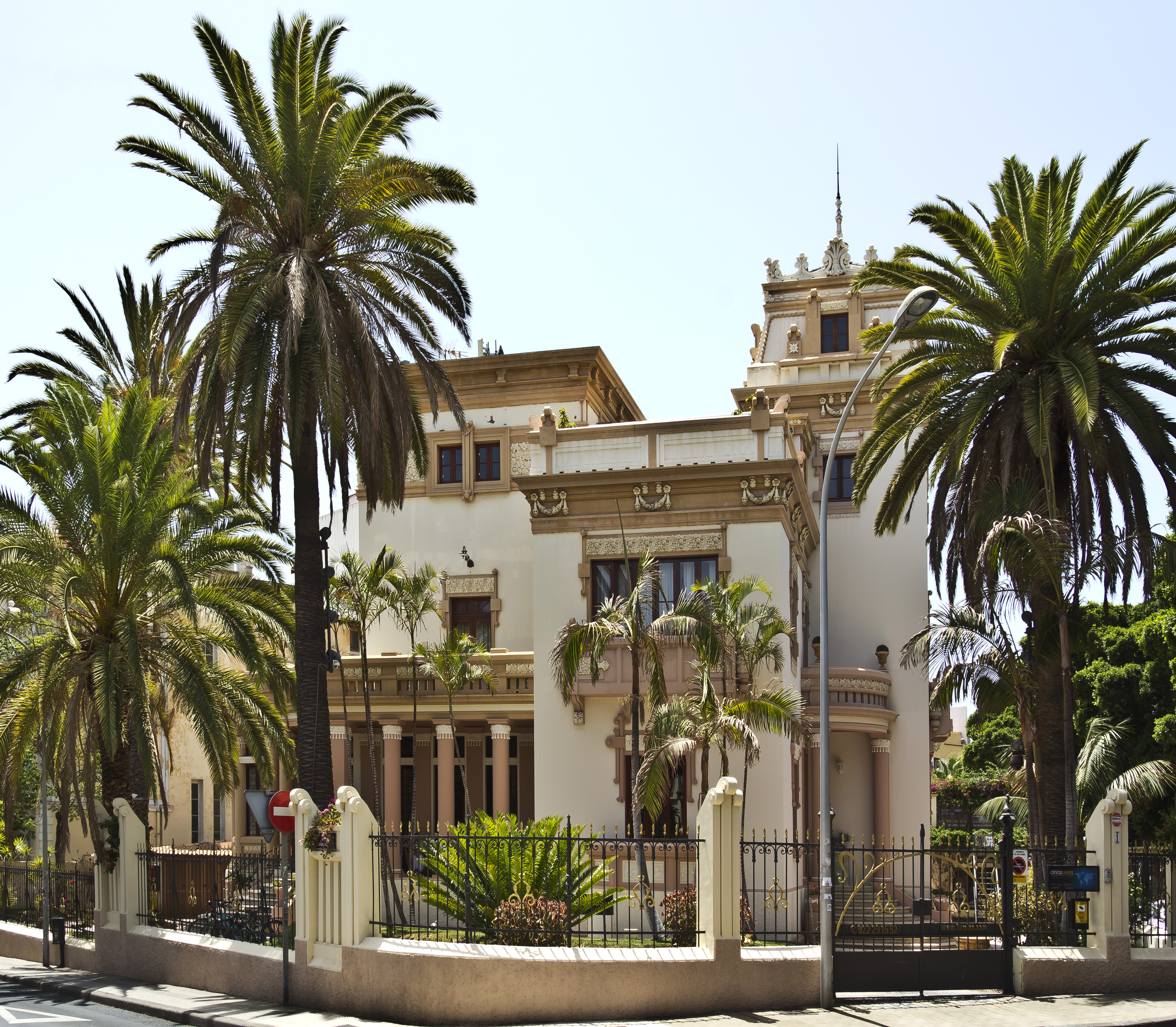 Der Palacete Martí Dehesa wurde im Jahr 1912 von dem Architekten Mariano Estanga y Arias Girón entworfen. Der Palacete befindet sich an der Plaza de 25 de Julio in Santa Cruz de Tenerife.